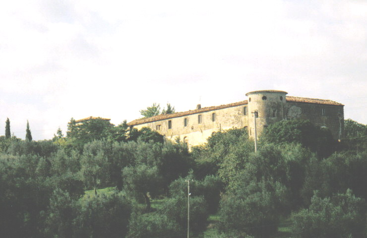 descrizione: veduta della Fattoria della Campigliola lavoro personale di Vinattieri Matteo che lascia in pubblico dominio il 01/02/2007; foto scattata da apparecchio non digitale nel settembre 2005 e rielaborata successivamente